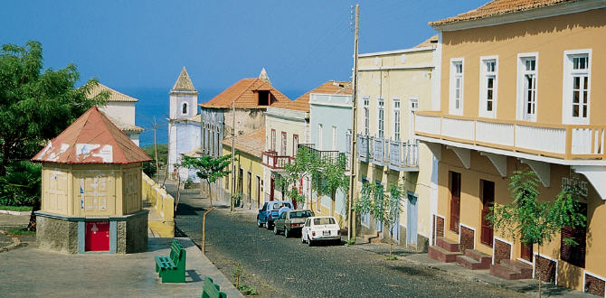 São Filipe, © Mike Goike 2006, egen foto